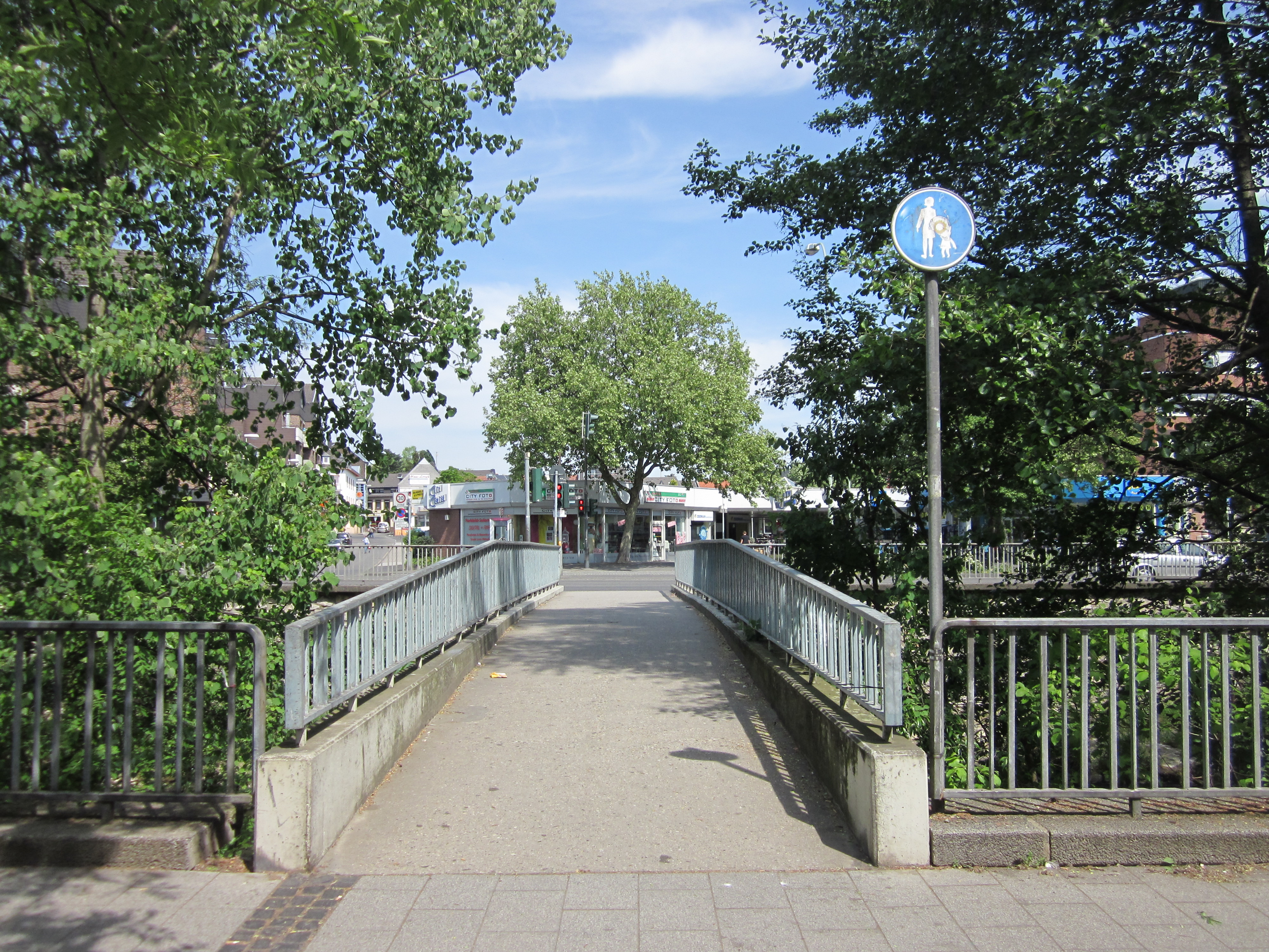 Fußgängerbetonbrückchen über die Inde in der Eschweiler Innenstadt zwischen Indestraße/Wollenweberstraße und Uferstraße